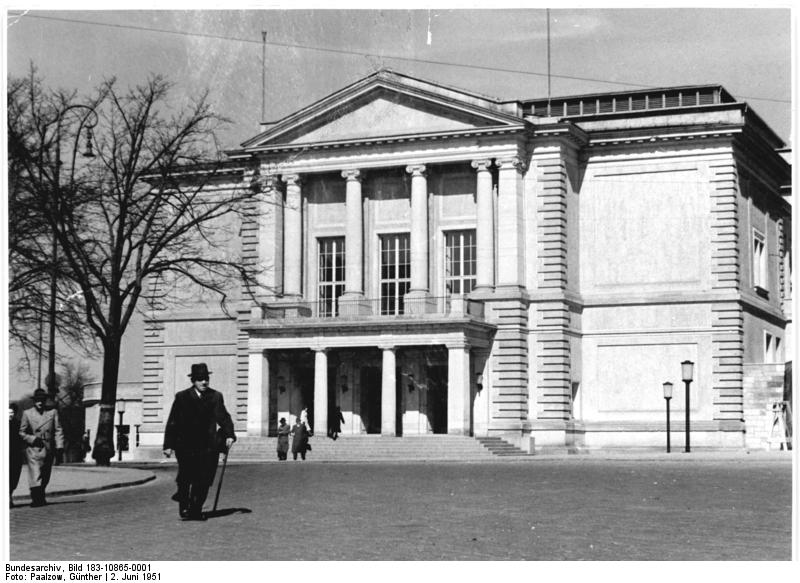 Halle, Stadttheater Unser Bild zeigt einen Blick auf das neu wiederhergestellte Stadttheater in Halle. Illus: Paalzow 2.6.1951 Das ehemalige Stadttheater in Halle wurde wiederaufgebaut und am 27.5.1951 als "Theater des Friedens" neu eröffnet UBz: Das "Theater des Friedens" in Halle.